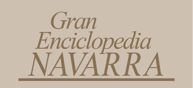 Recreación aproximada de la cabecera